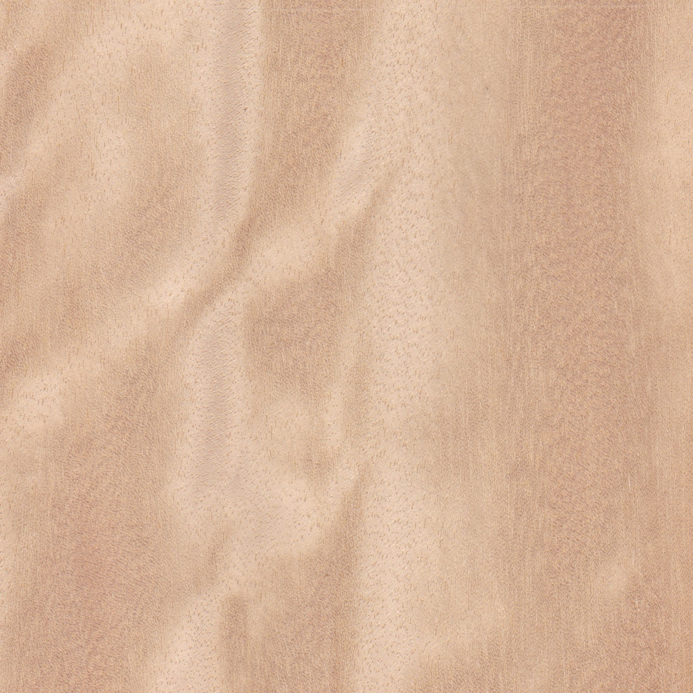 Feuille de placage d'Avodiré.